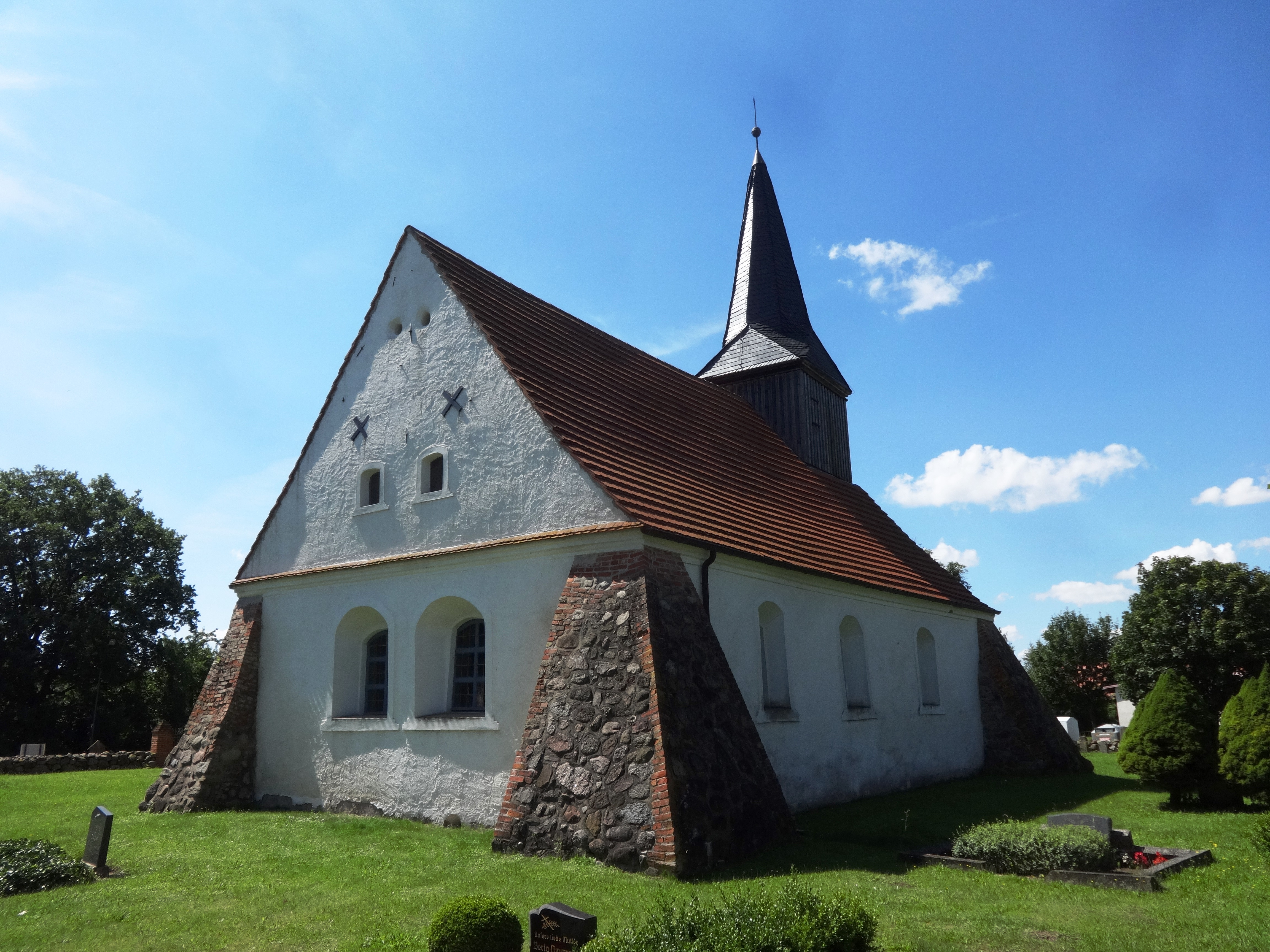 Die Kirche in Rossin im Landkreis Vorpommern-Greifswald entstand im 15. Jahrhundert. 1678 wurde sie tiefgreifend verändert. Im Innern steht unter anderem ein Kanzelaltar aus dem Jahr 1771.